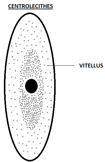 ceci est un schéma d'un type d'oeuf.